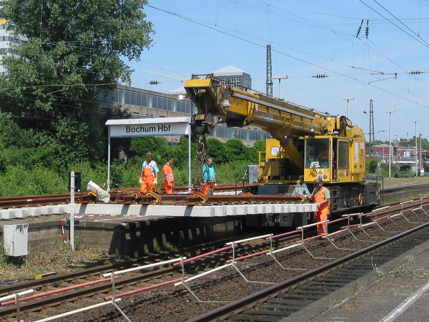 Schienenkran von Gottwald beim Weicheneinbau in Bochum Hbf